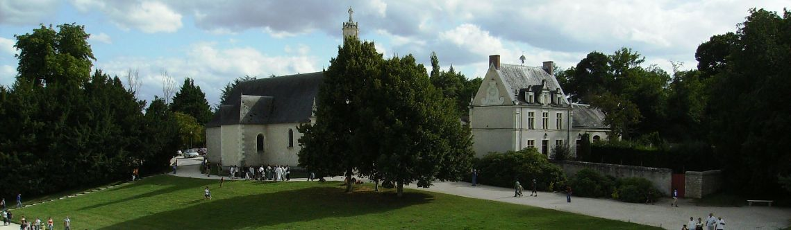 Chambord mairie et église France